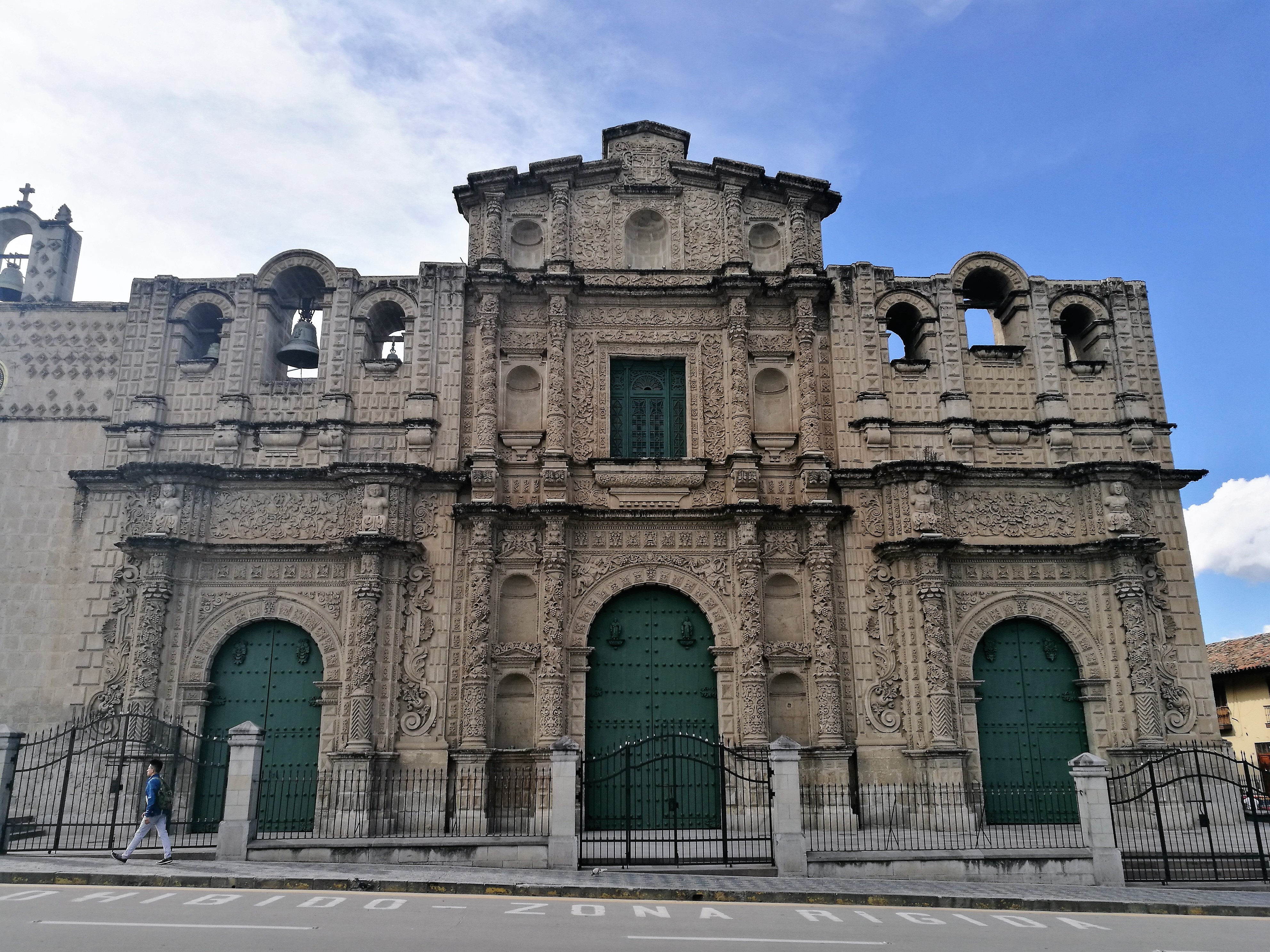 Façana de la Catedral de Cajamarca